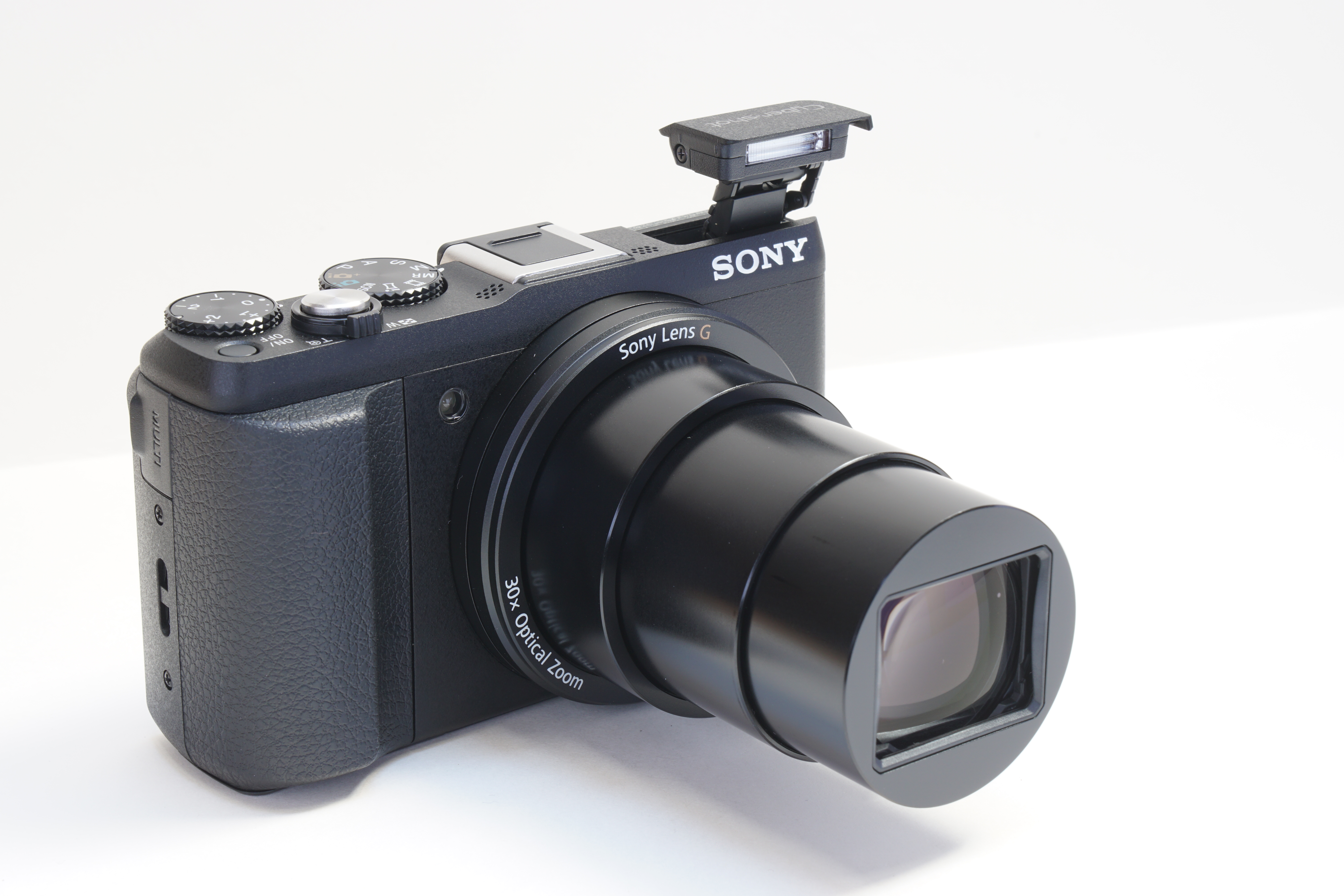 Le compact à grand zoom Sony CyberShot HX60.